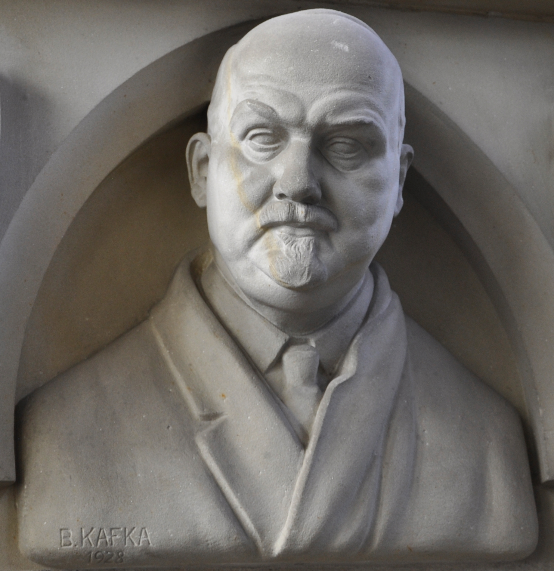 Busta Kamila Hilberta v novodobém triforiu katedrály sv. Víta v Praze od Bohumila Kafky z roku 1928.